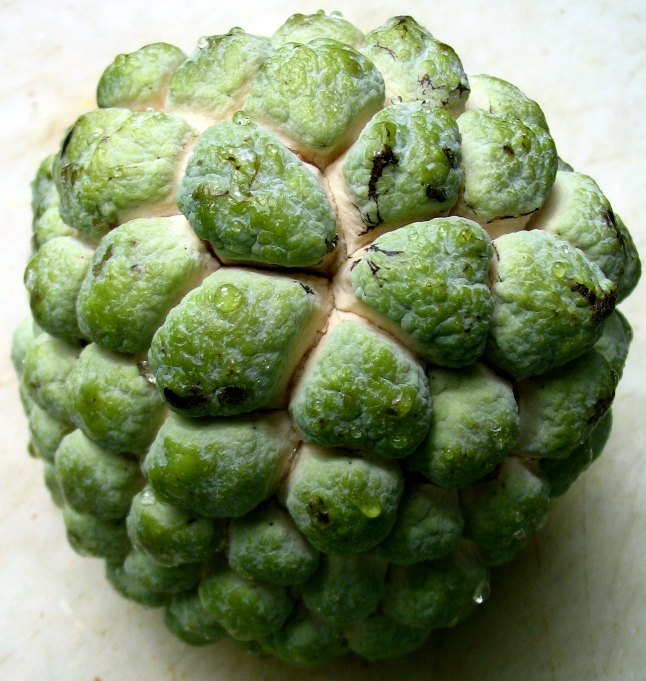 Custard Apple (Annona squamosa)